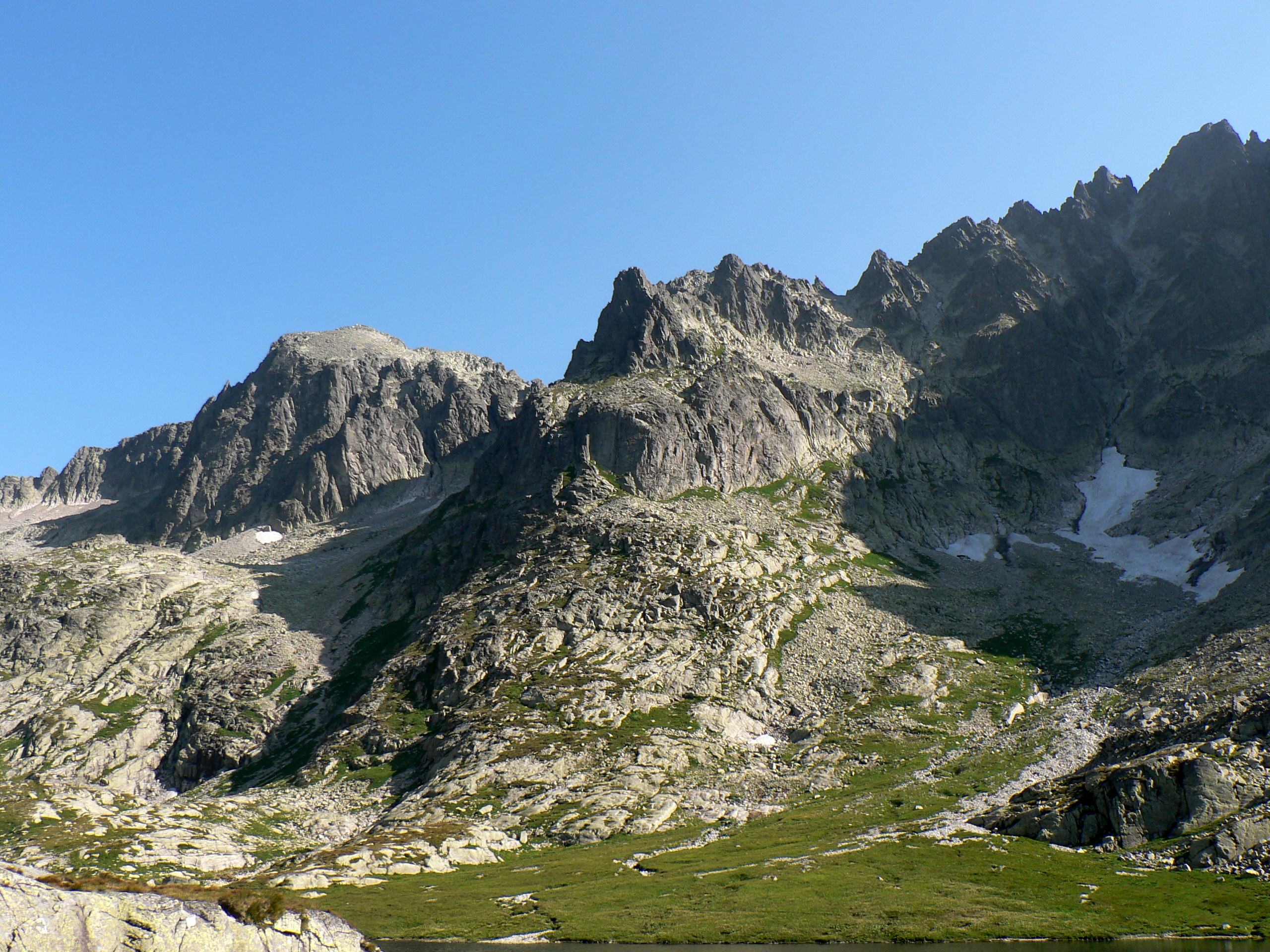 Baranie Rogi i Spiska Grzęda